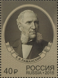 Банк России 1